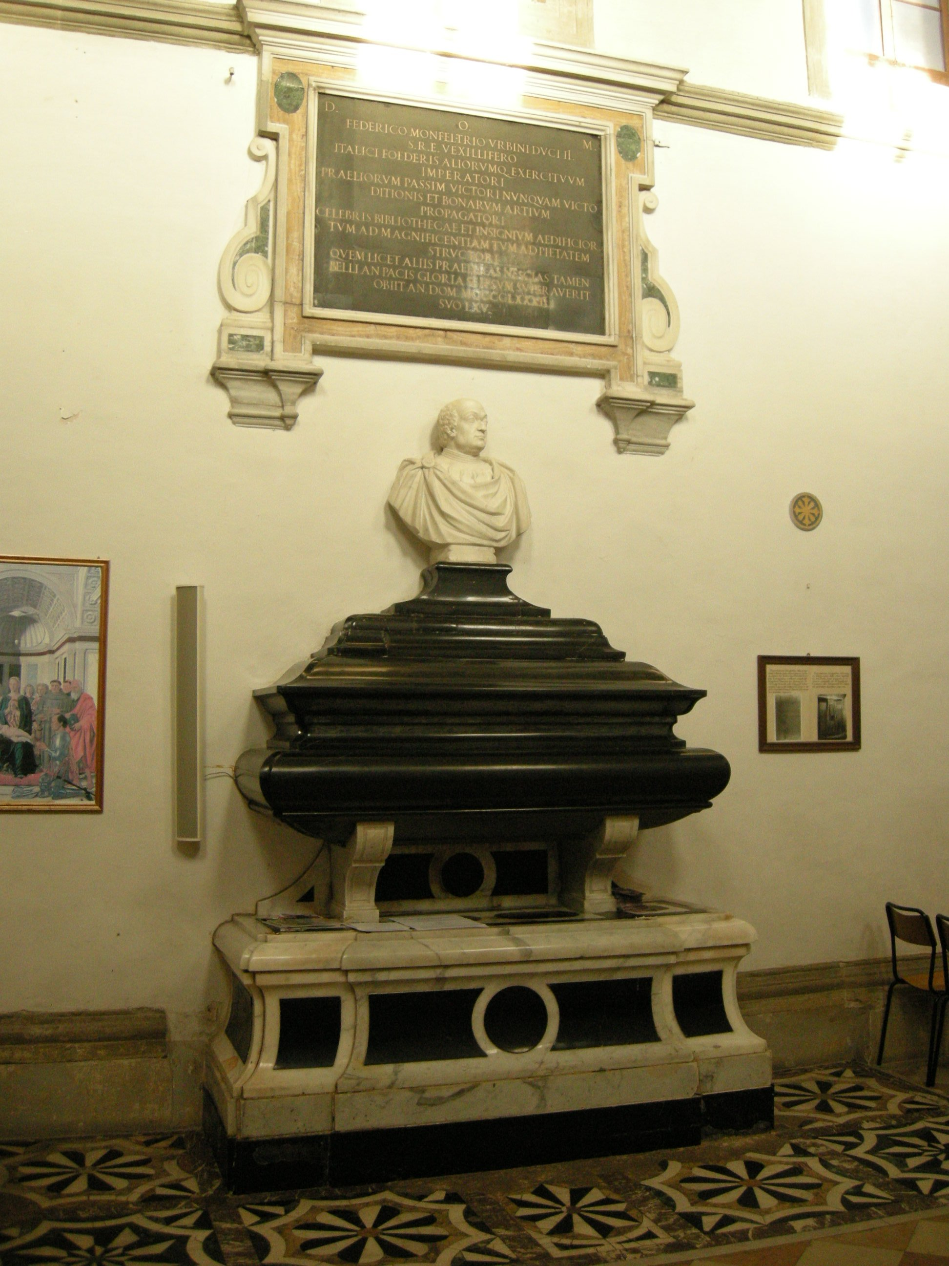 San bernardino, interno, tomba di federico da montefeltro